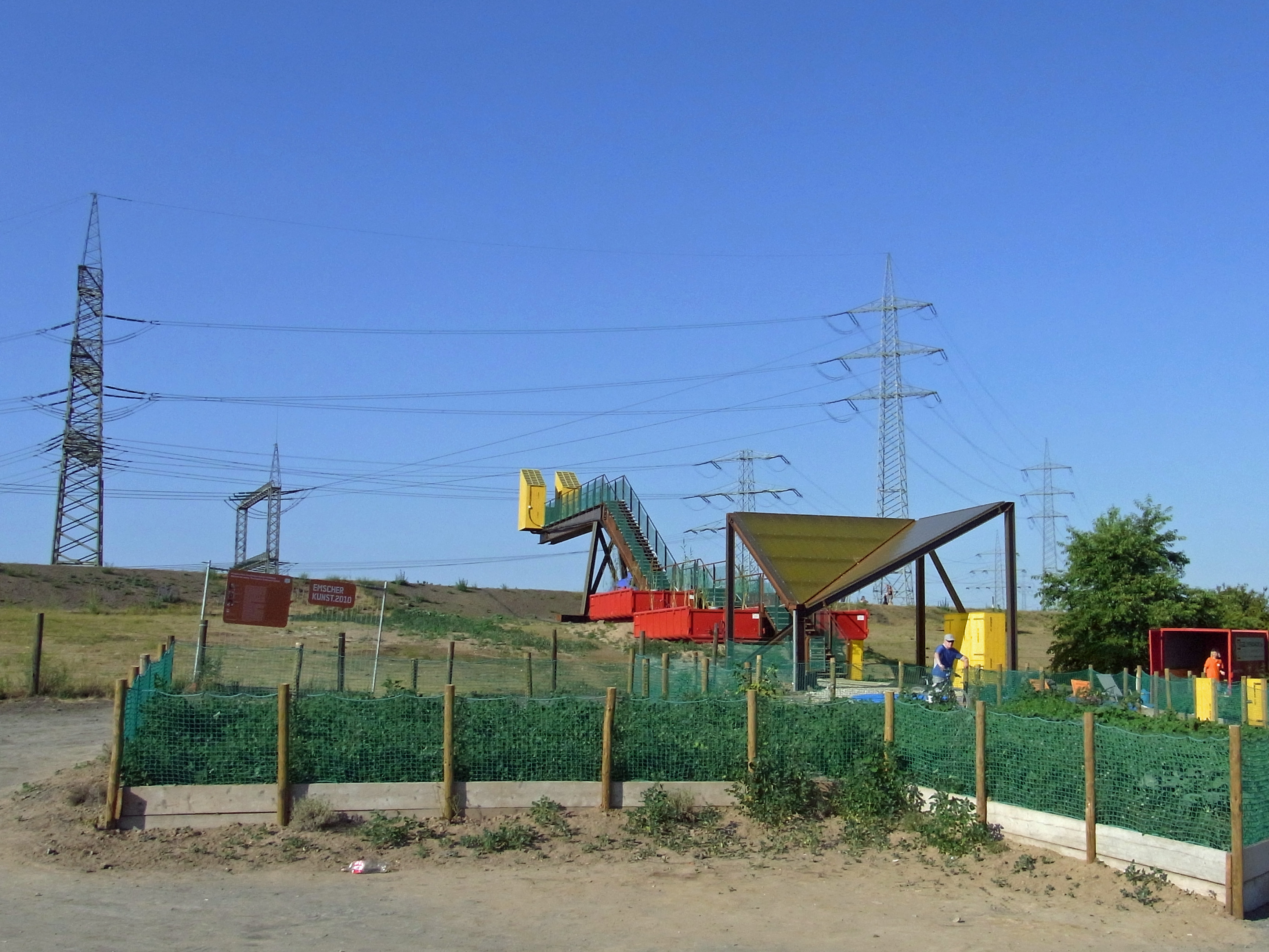 Emscherkunst.2010 Marjetica Potrc und Ooze Architects (Eva Pfannes und Sylvain Hartenberg): Between the Waters: The Emscher Community Garden